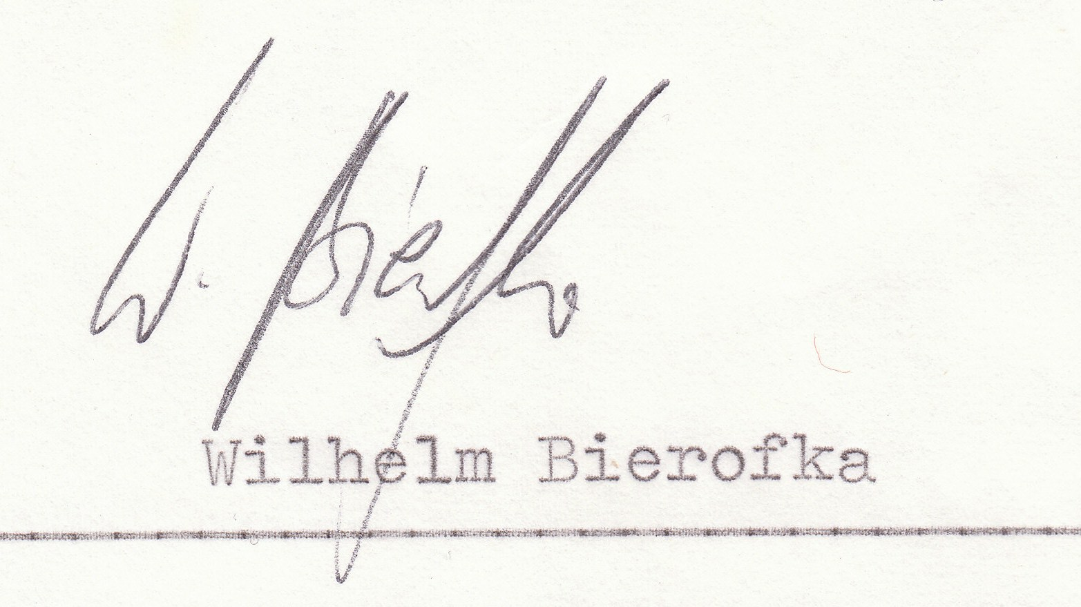 Autogramm des ehem. Bundesliga-Spielers von 1978